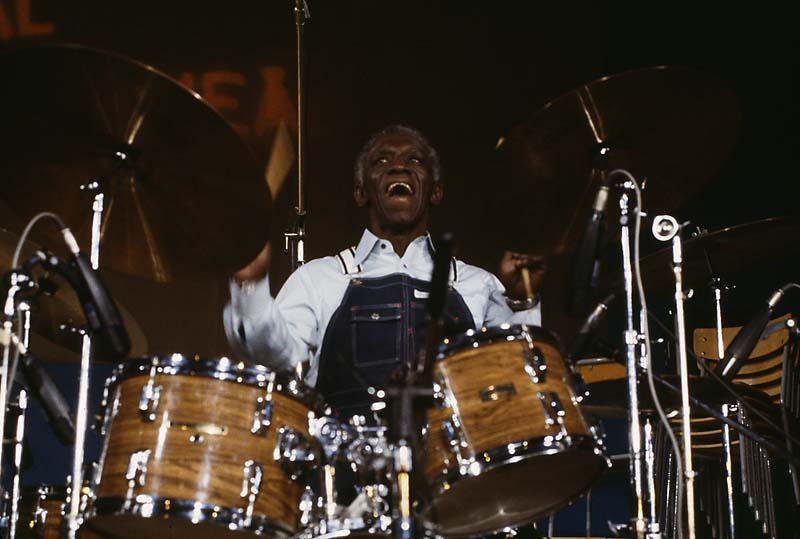 Art Blakey, trummor och ledare för The Jazz Messengers, på Umeå jazzfestival.; Musik; Personer; Övrigt